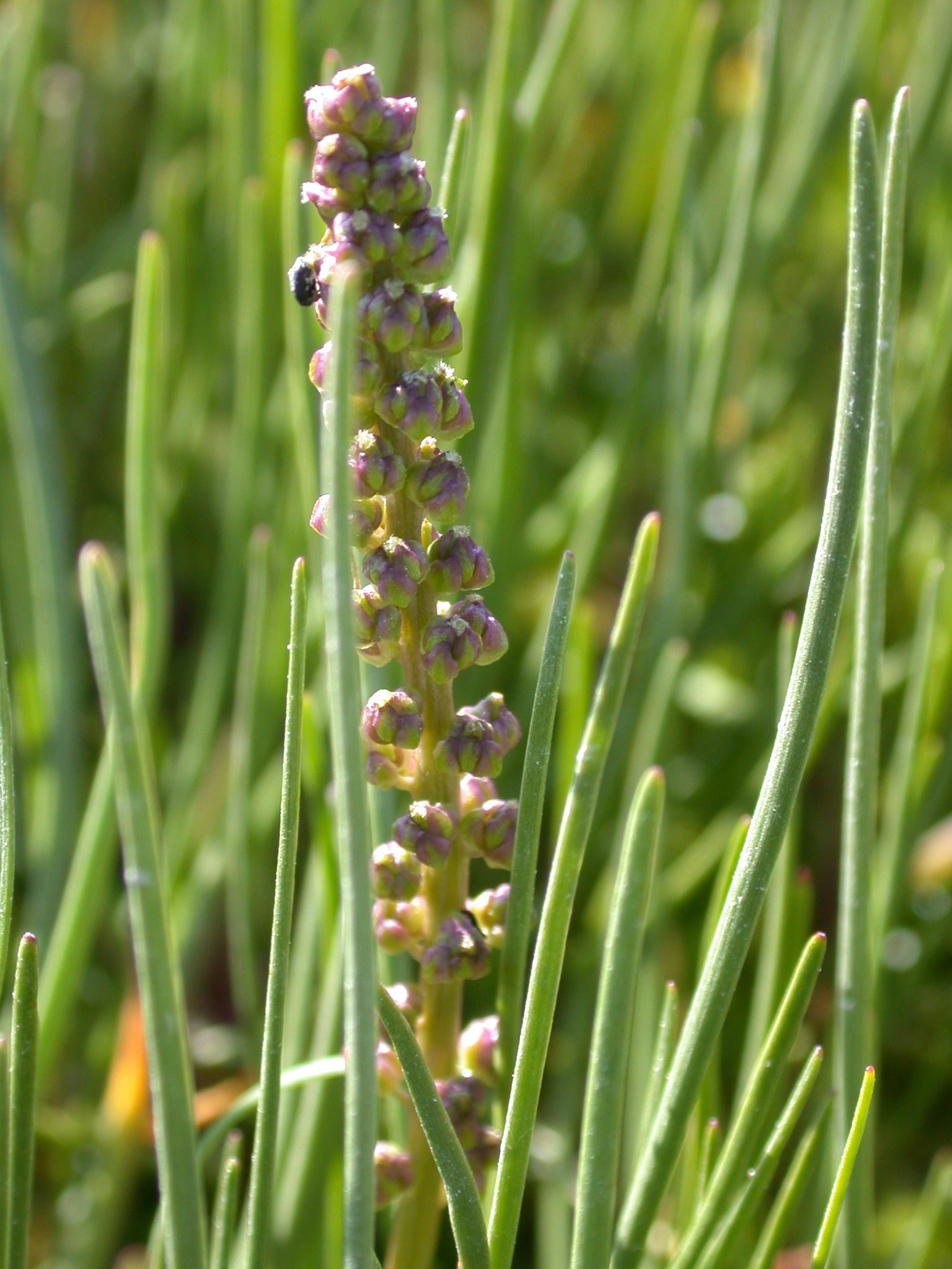 Triglochin maritima Baie d'Authie Nord (Somme), France